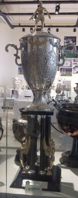 Taça do Campeonato Brasileiro de Futebol Série C de 1999 Terceira Divisão do Campeonato Brasileiro de Futebol.